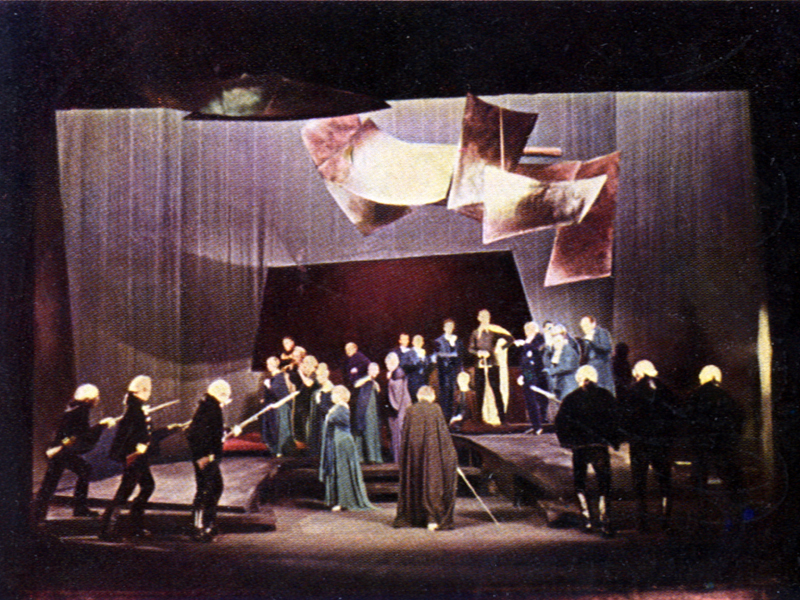 Dziady A. Mickiewicza, inscenizacja K. Skuszanka i J. Krasowski, scenografia J. Szajna, Teatr Ludowy, Nowa Huta 1962